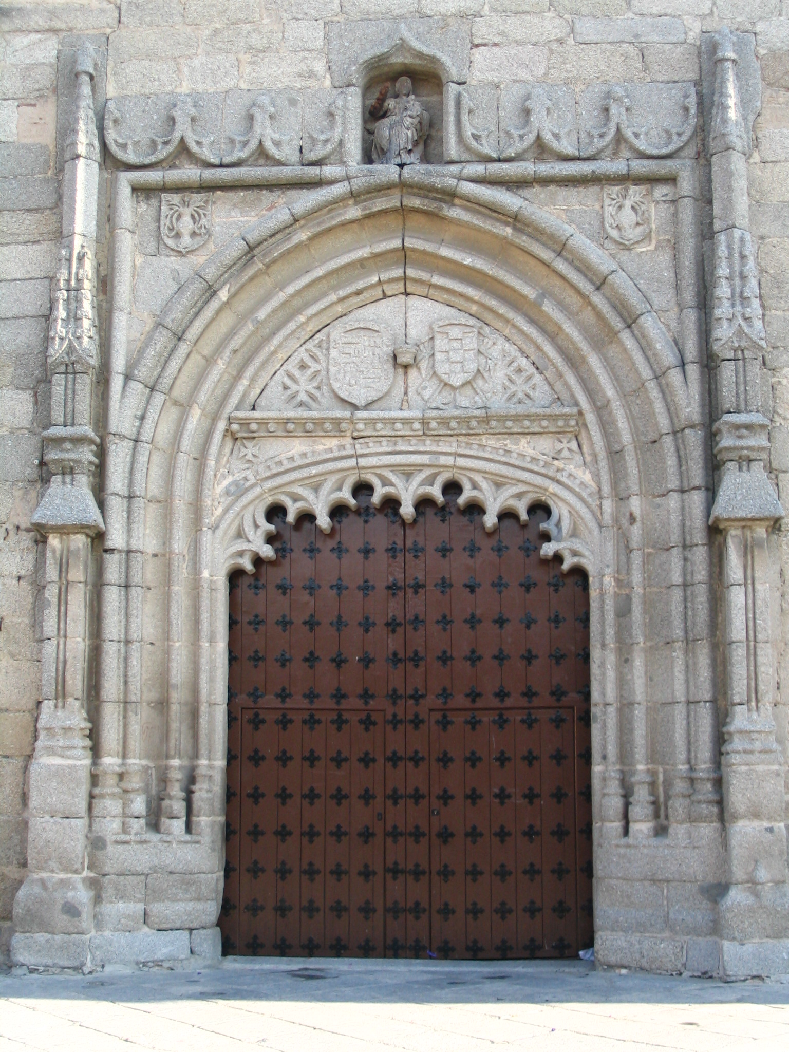 Portada sur de la iglesia Ntra Sra del Castillo, Macotera.